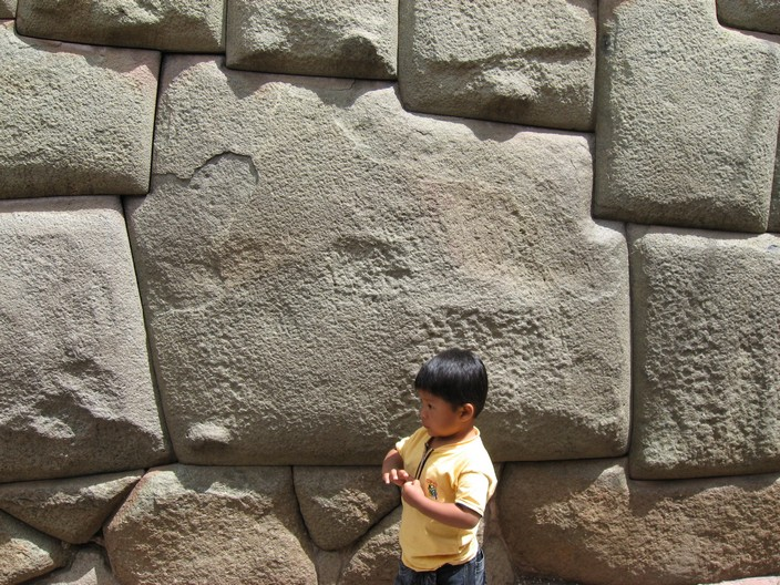 Камень с 12 углами точно вмурован в стену. Куско. Перу